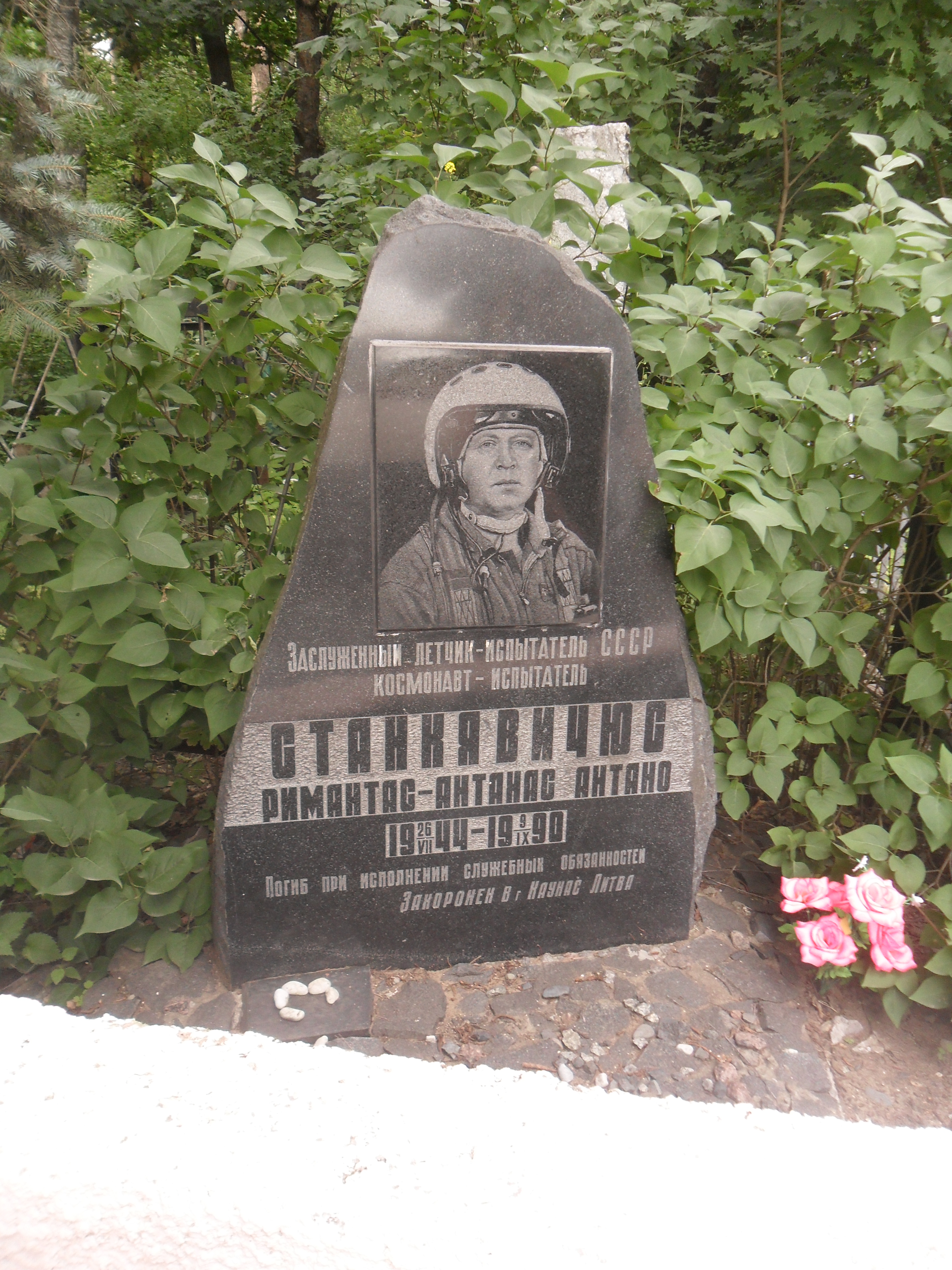 Кенотаф заслуженному лётчику-испытателю СССР Римантасу Станкявичюсу на Быковском кладбище Жуковского.